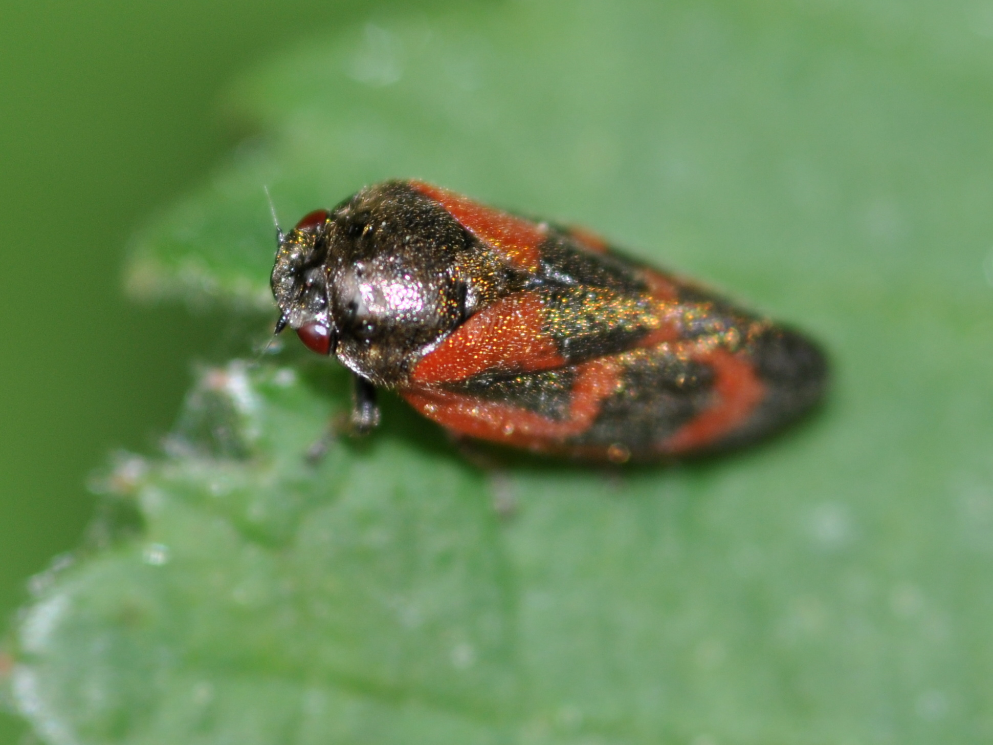 Kiefernblutzikade in Bahrenfeld, Hamburg.